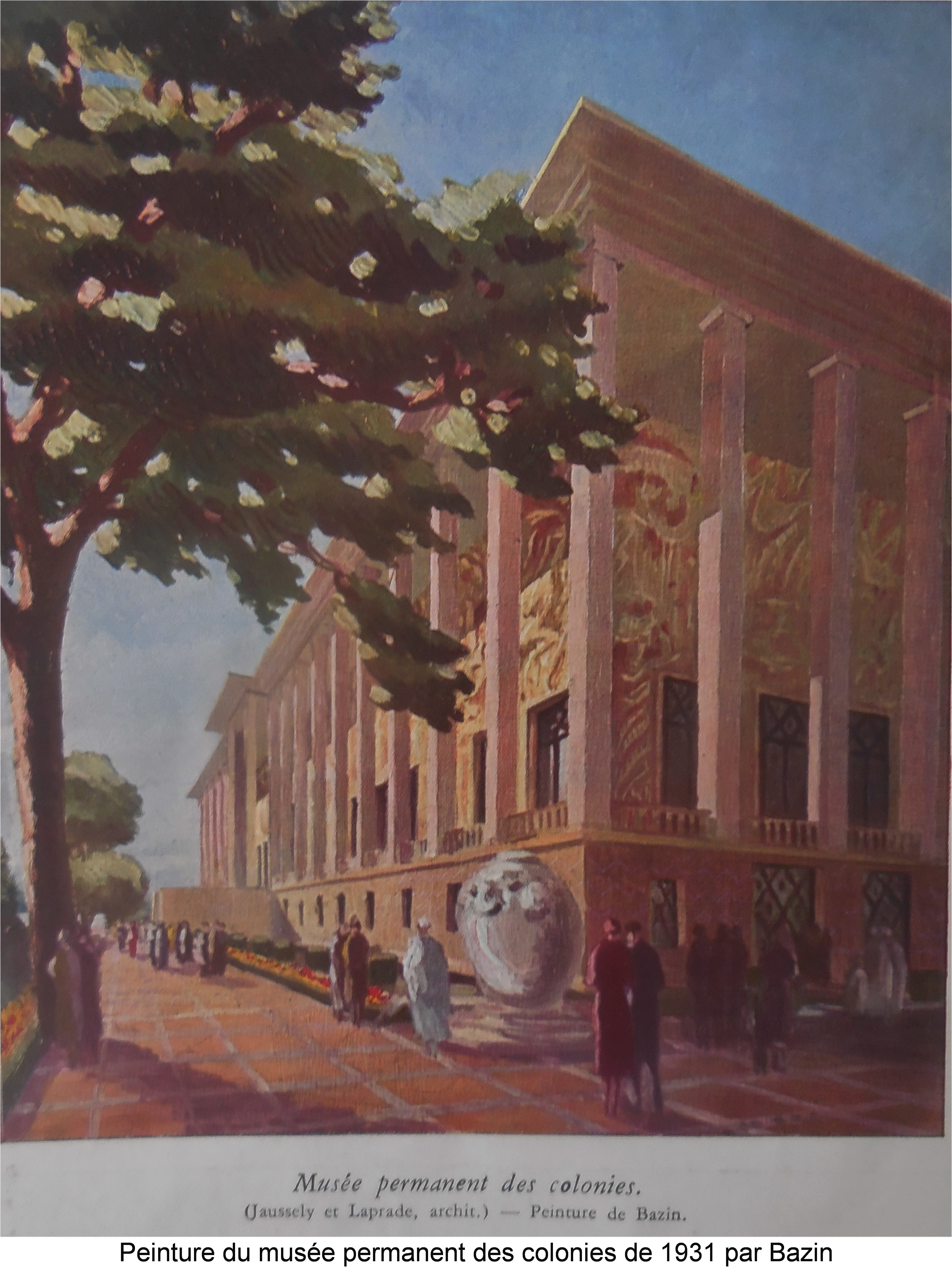 Peinture réalisée par Bazin du musée des colonies lors de l'exposition coloniale de 1931. Cette peinture se trouve dans une numéro spécial de l'Illustration de 1931